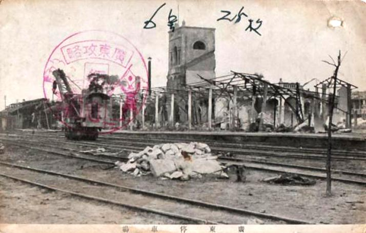 日軍侵華期間照片。